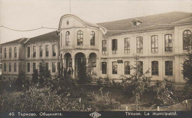 Бившият турски конак в Търново, където заседава Учредителното събрание.